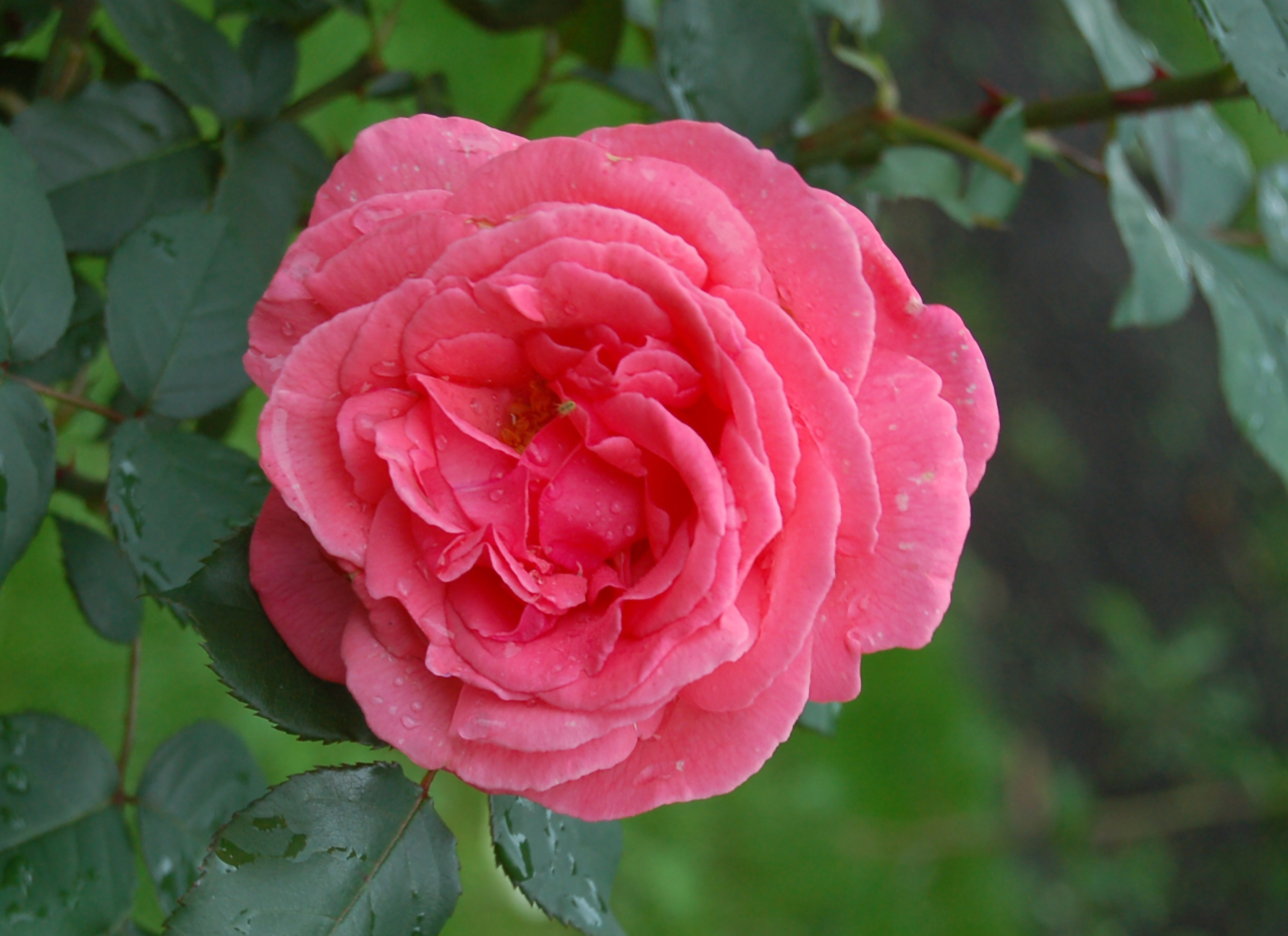 Floribunda Pariser Charme (Tantau 1965)